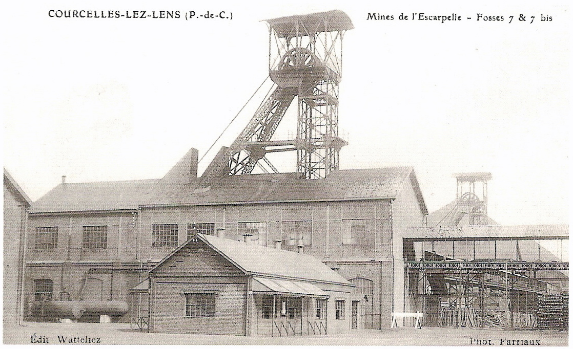 La Fosse n° 7 - 7 bis de la Compagnie des mines de l'Escarpelle était un charbonnage constitué de deux puits situé à Courcelles-lès-Lens, Pas-de-Calais, Nord-Pas-de-Calais, France.